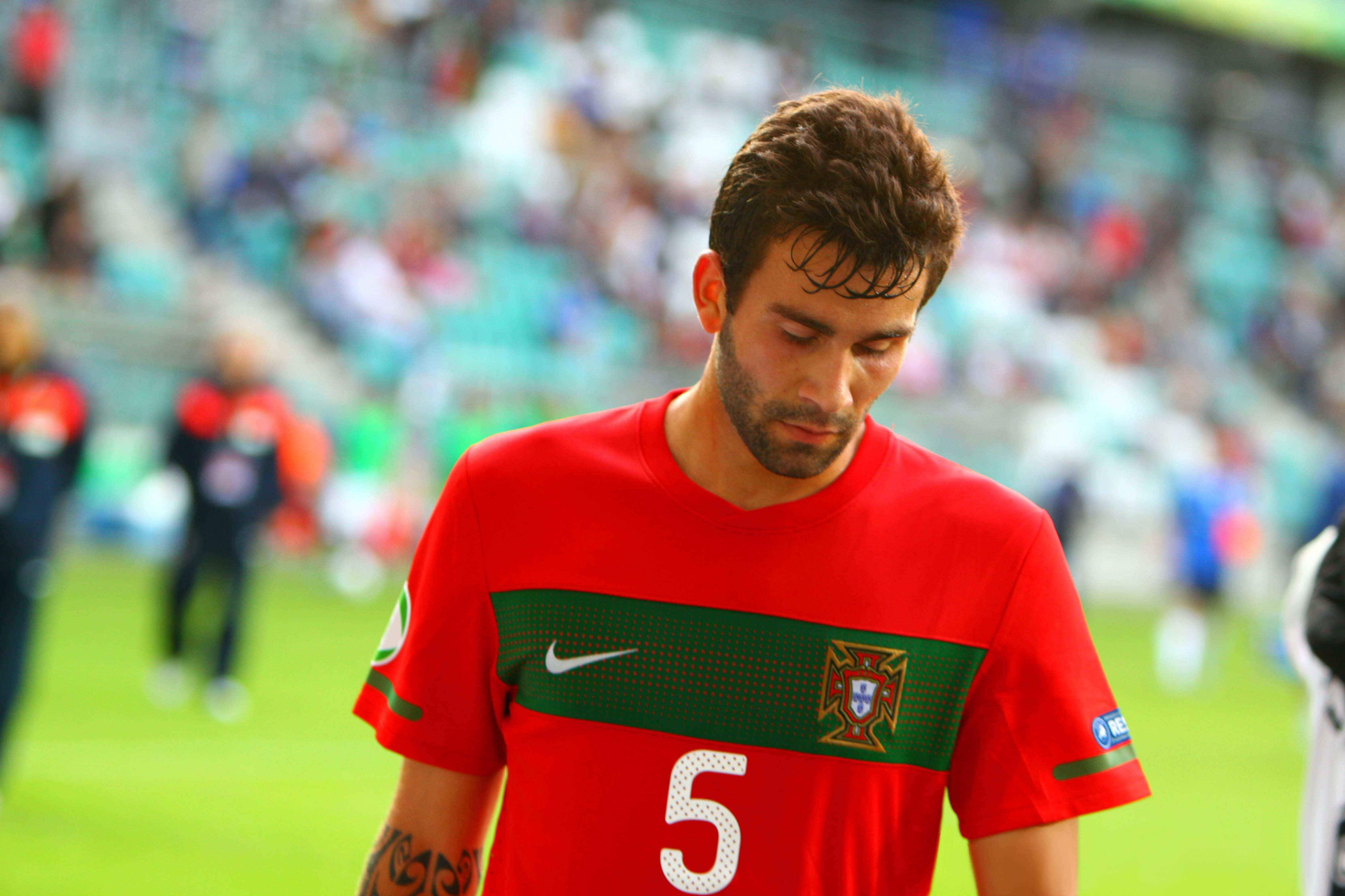 U-19 Estonia vs Portugal.